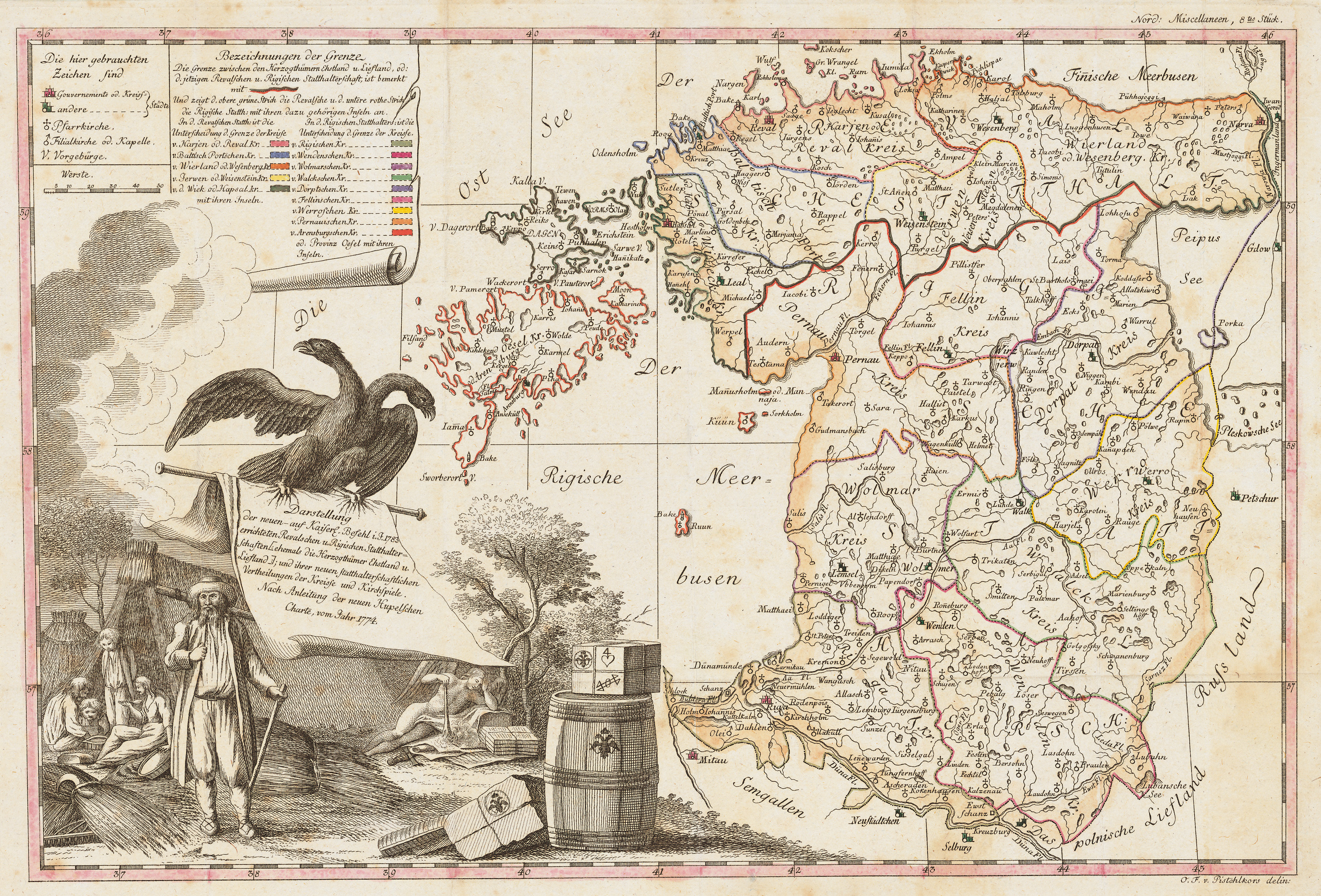 Darstellung der neuen auf Keiserl(ichen) Befehl i. J. 1783 errichteten Revalschen und Rigischen Statthalterschaften (ehemals die Herzogthümer Ehstland u. Liefland); und ihrer neuen statthalterschaftlichen Vertheilungen der Kreisse und Kirchspiele. Copper engraving, ca 1:1 500 000, 39 x 26 cm.